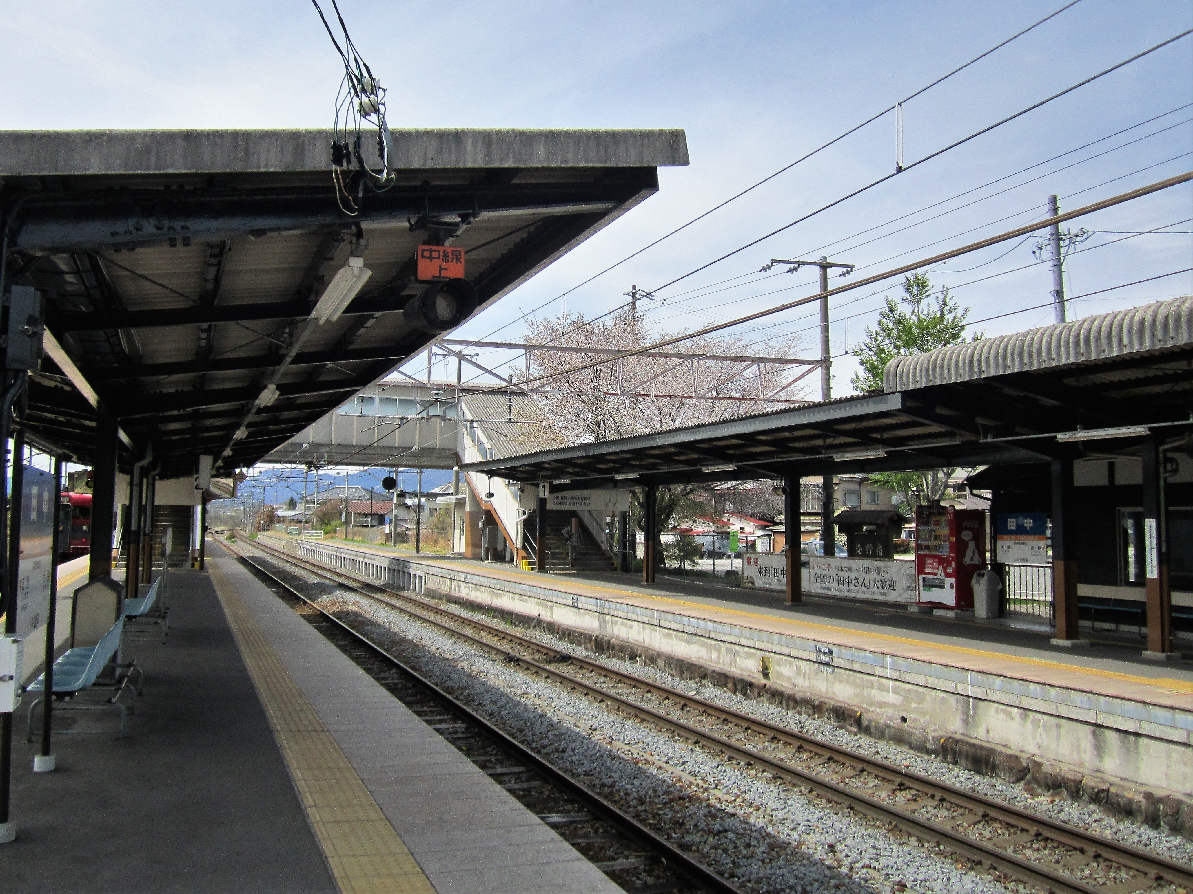 しなの鉄道 田中駅ホーム Canon PowerShot A2200